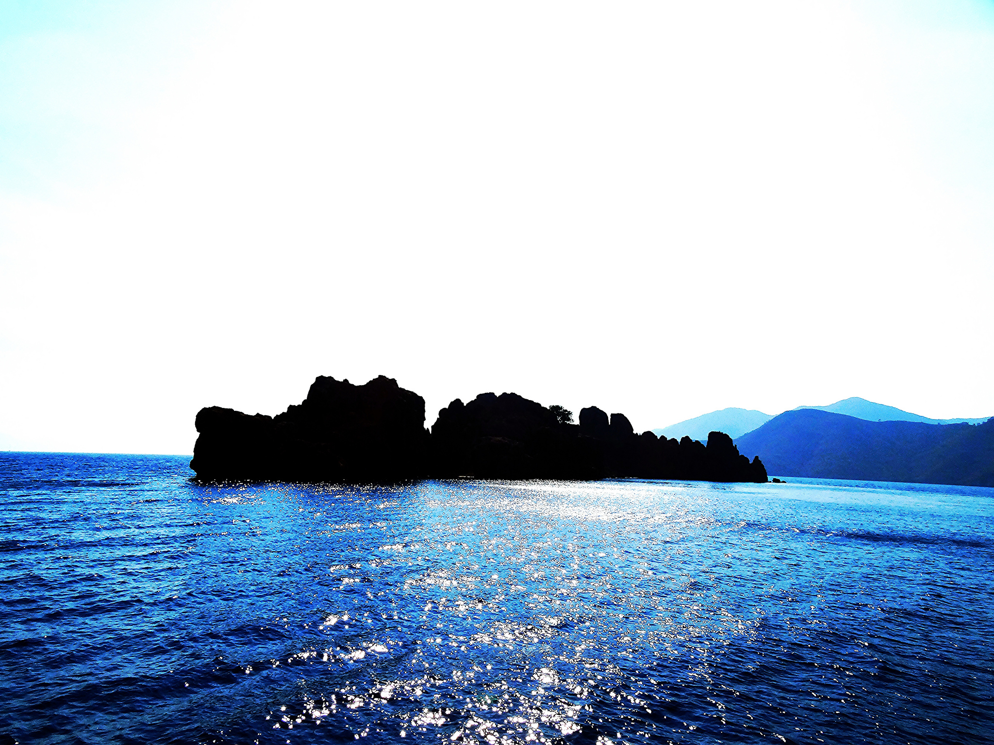 Dişlice Adası Marmaris Hisarönü